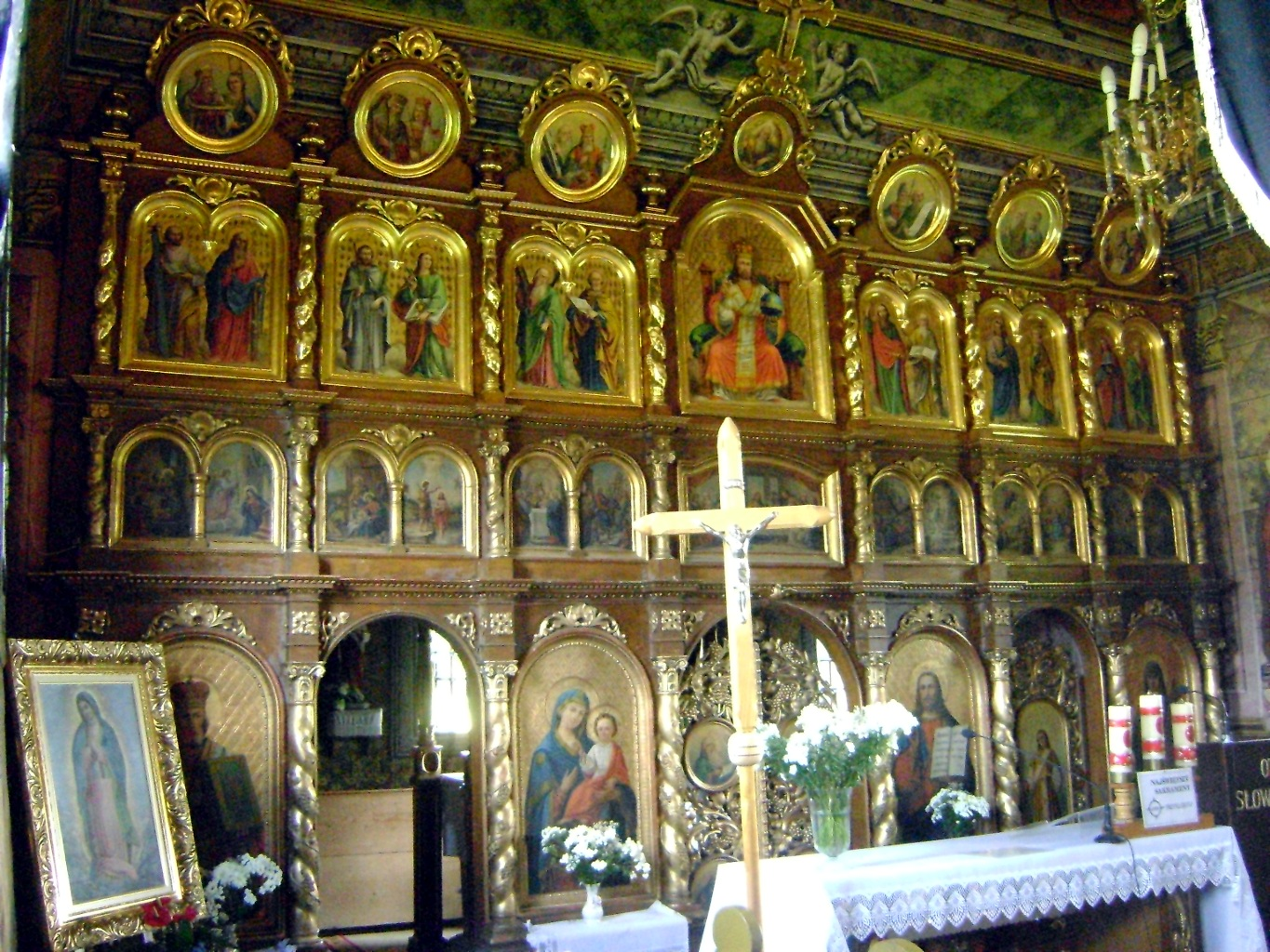 Kwiatoń - dawna cerkiew greckokatolicka, obecnie rzymskokatolicki kościół filailny, ok. 1700 (Ikonostas))